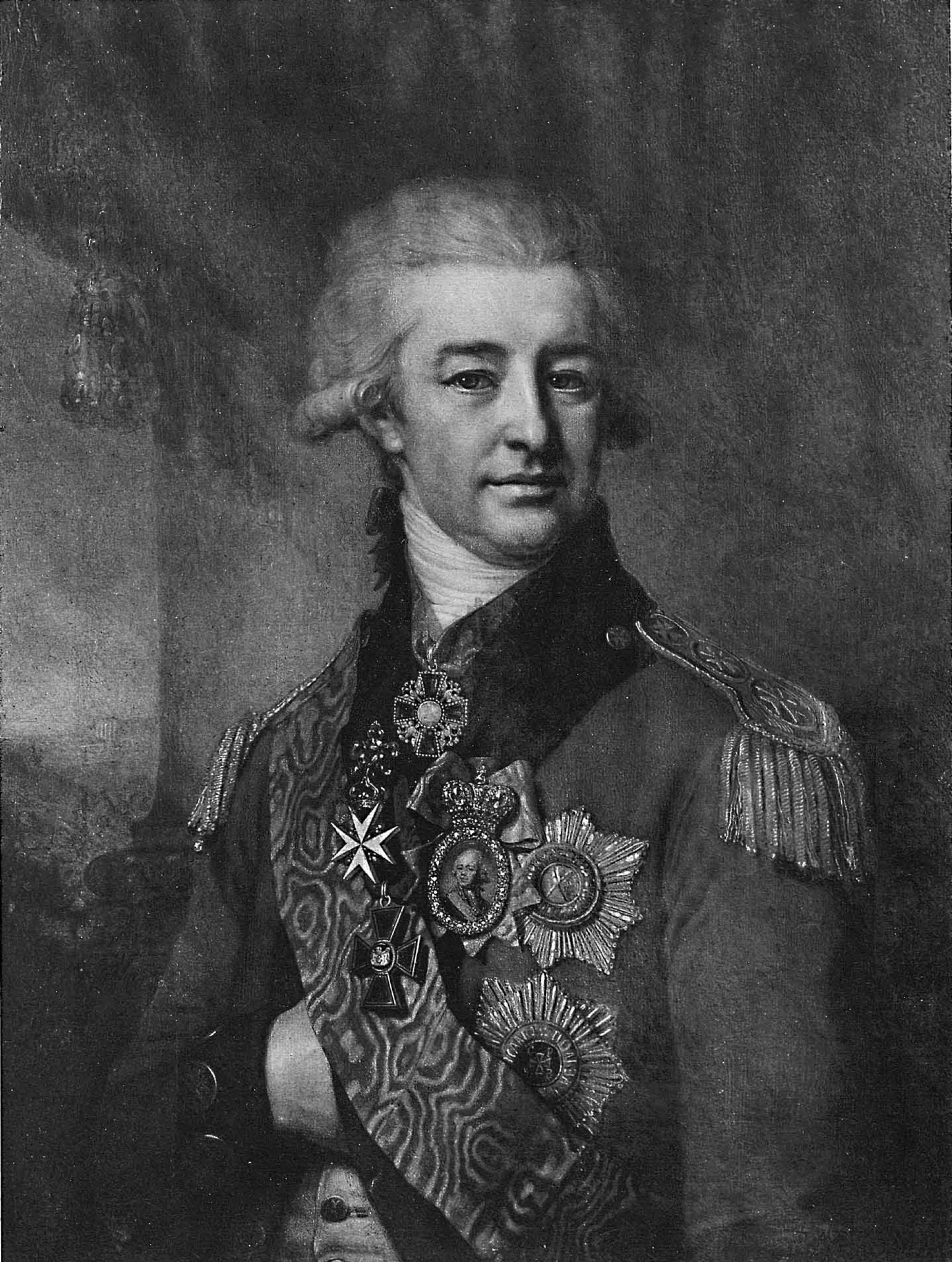 Светлейший князь Пётр Васильевич Лопухин (1753-1827)